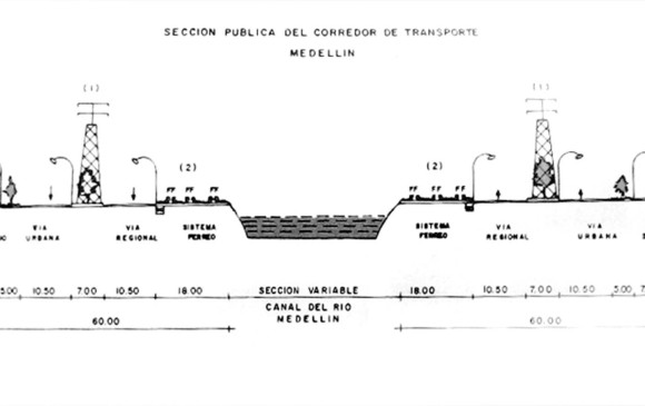 Imagen del corredor de transporte de Medellín en el Plan Director de 1959